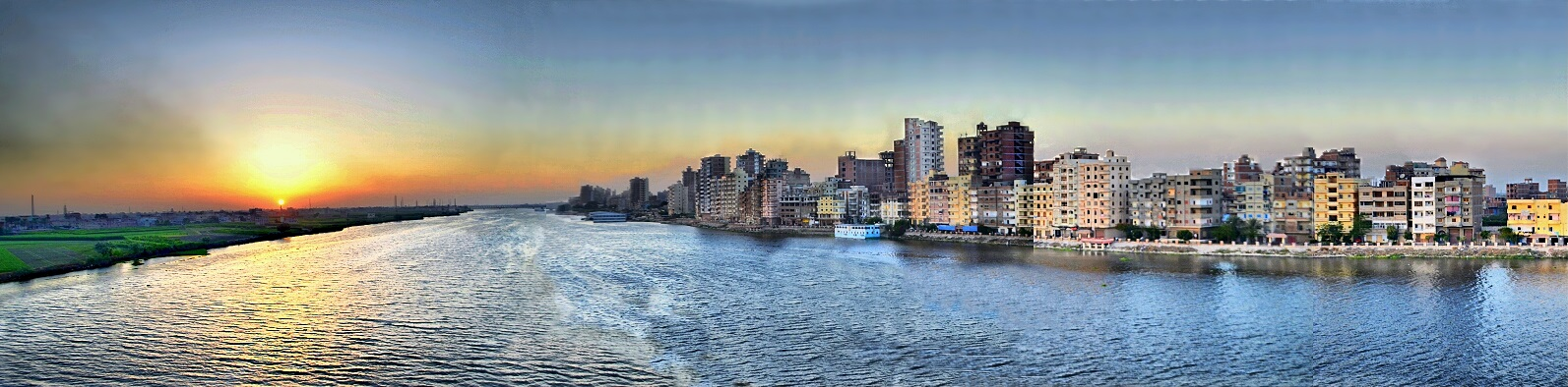 صورة بانورامية لمدينة دسوق بالمدى الديناميكي العالي